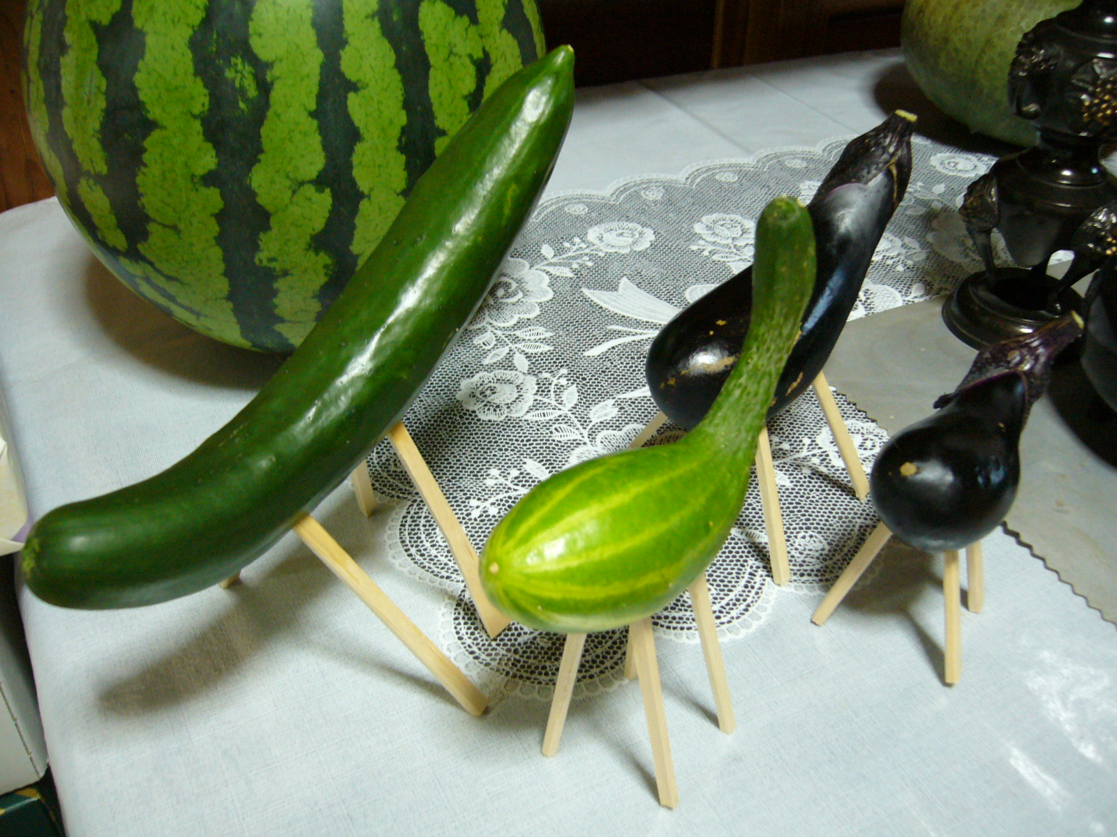 syoryou-uma,obon,katori-city, Japan